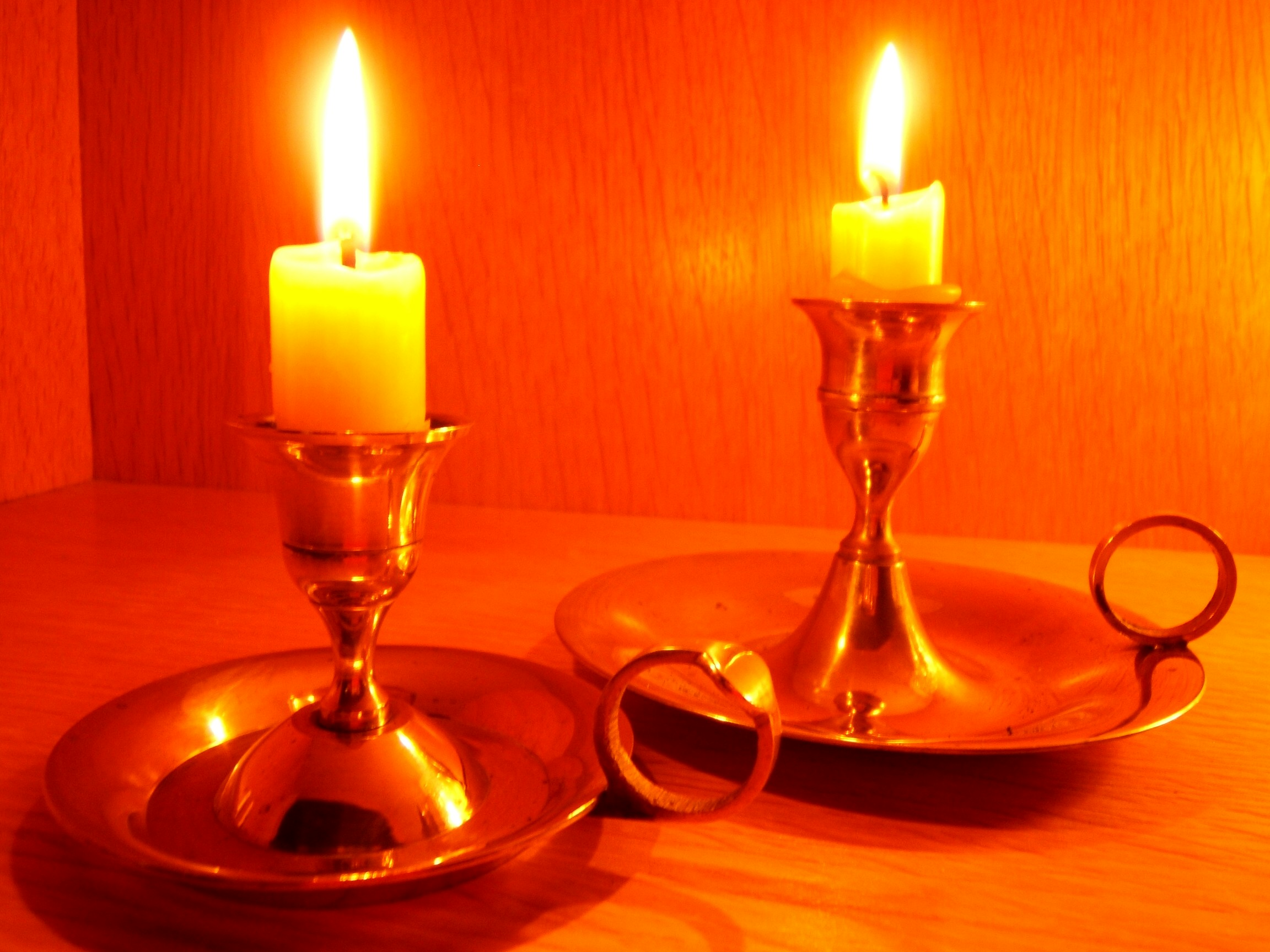 Description Brandende koperen blakers GFDL Brandende koperen blakers